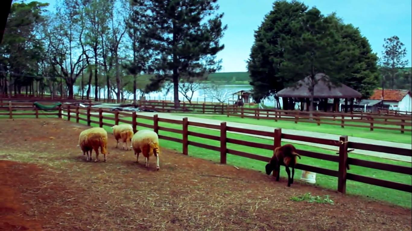 Área das Ovelhas na Fazendinha